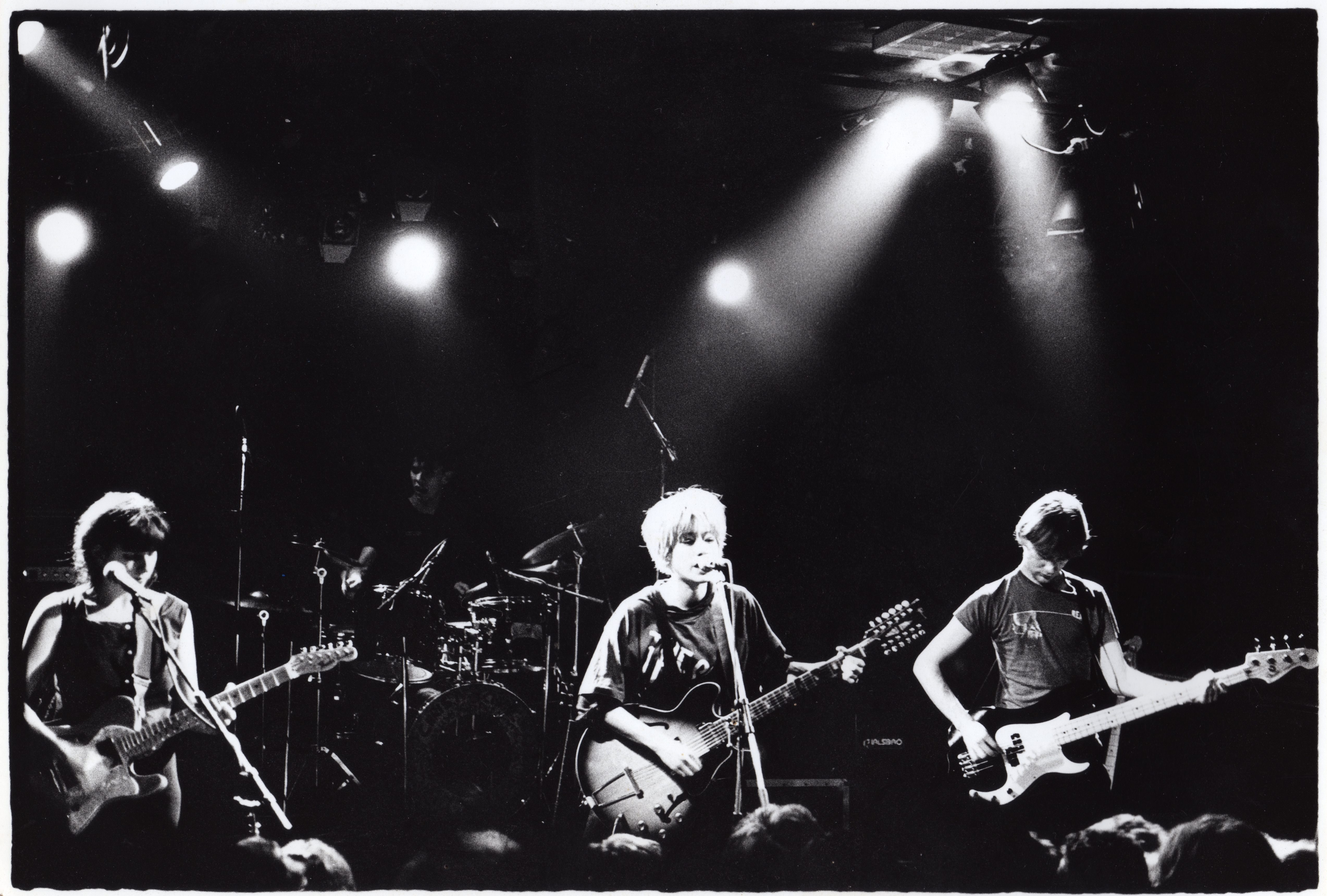 Lush et Pale Saint jouant ensemble pendant les rappels d'un concert à l'Ubu de Rennes